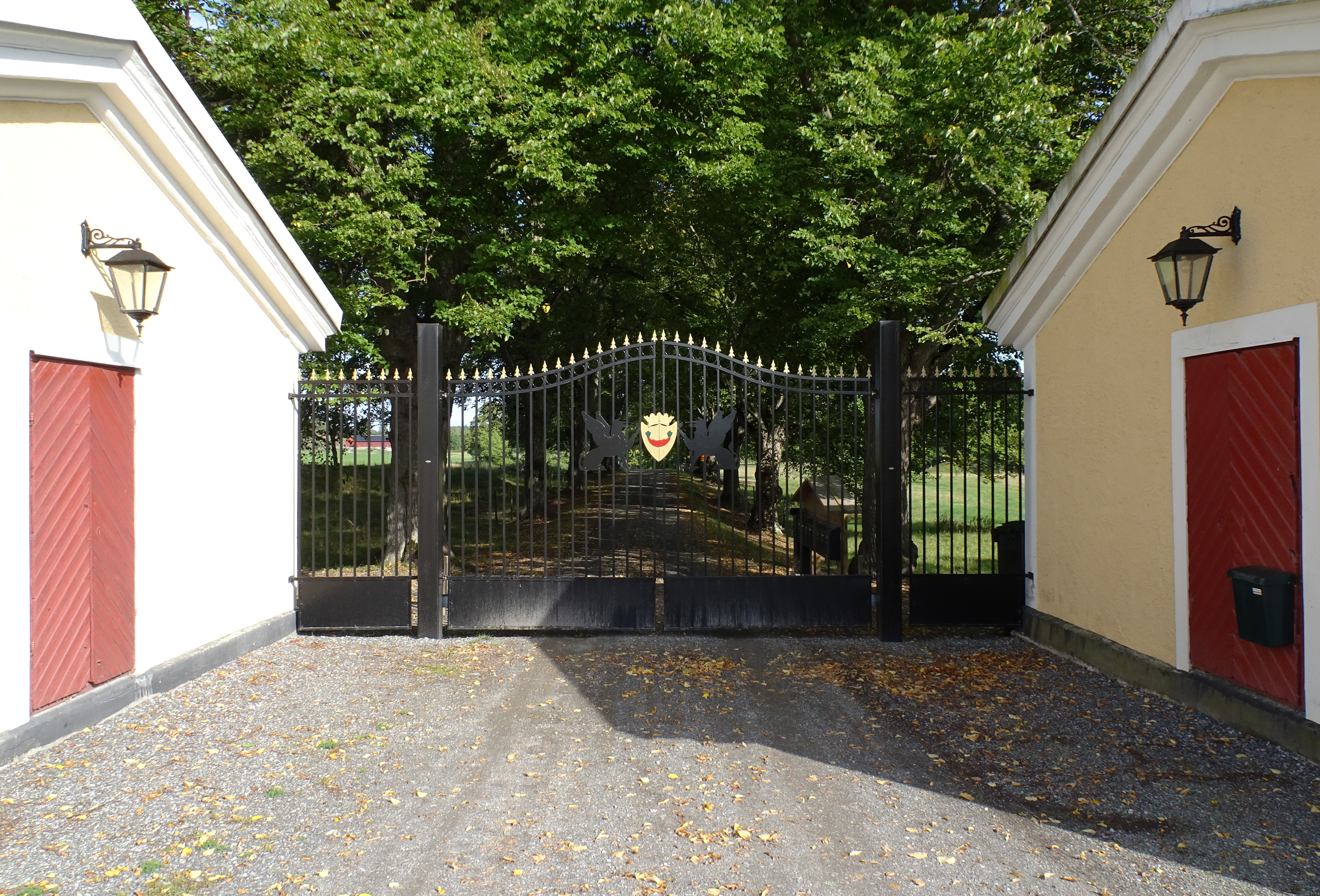 Vibyholms slott, grind